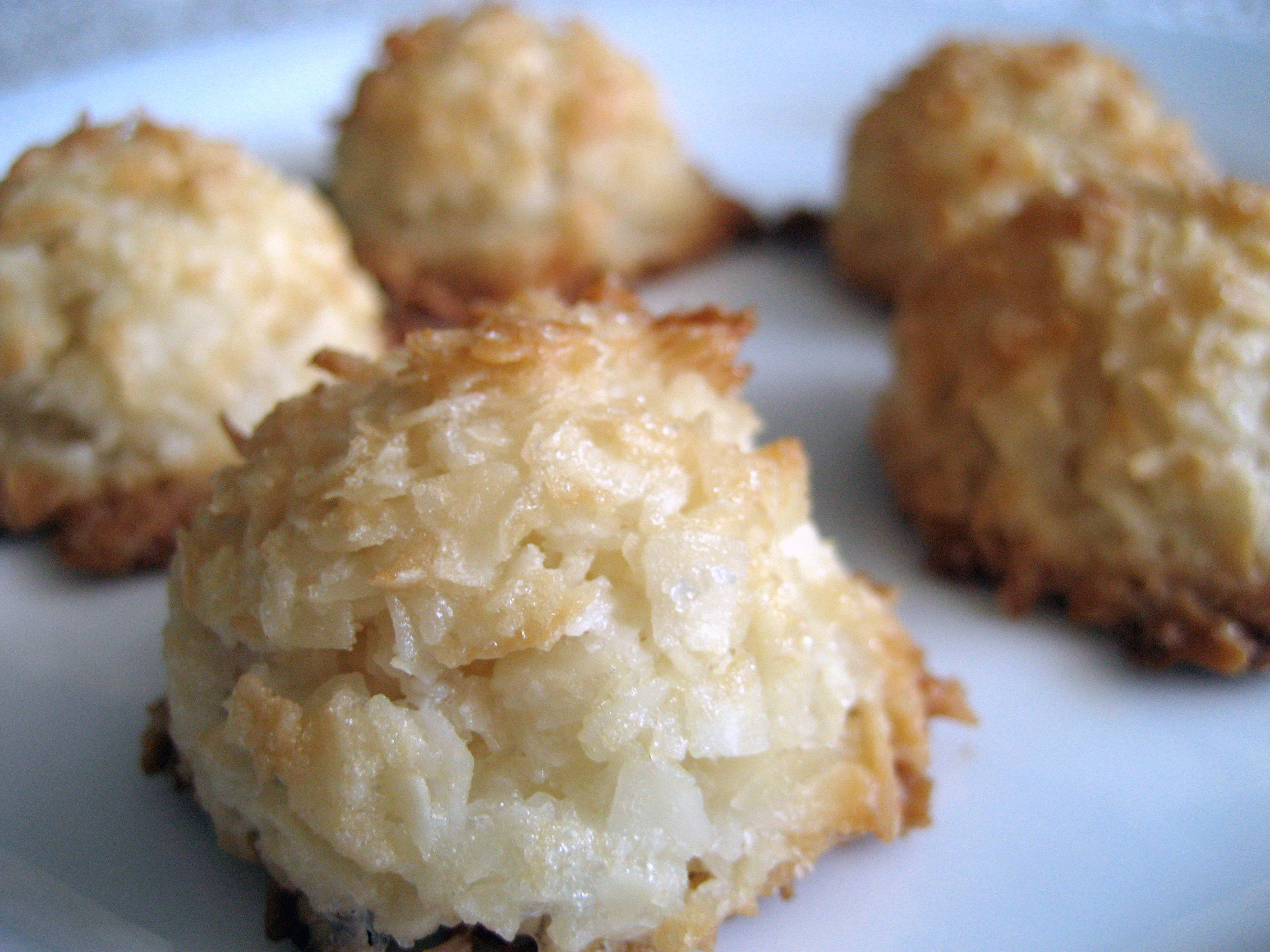 Basic coconut macaroons.